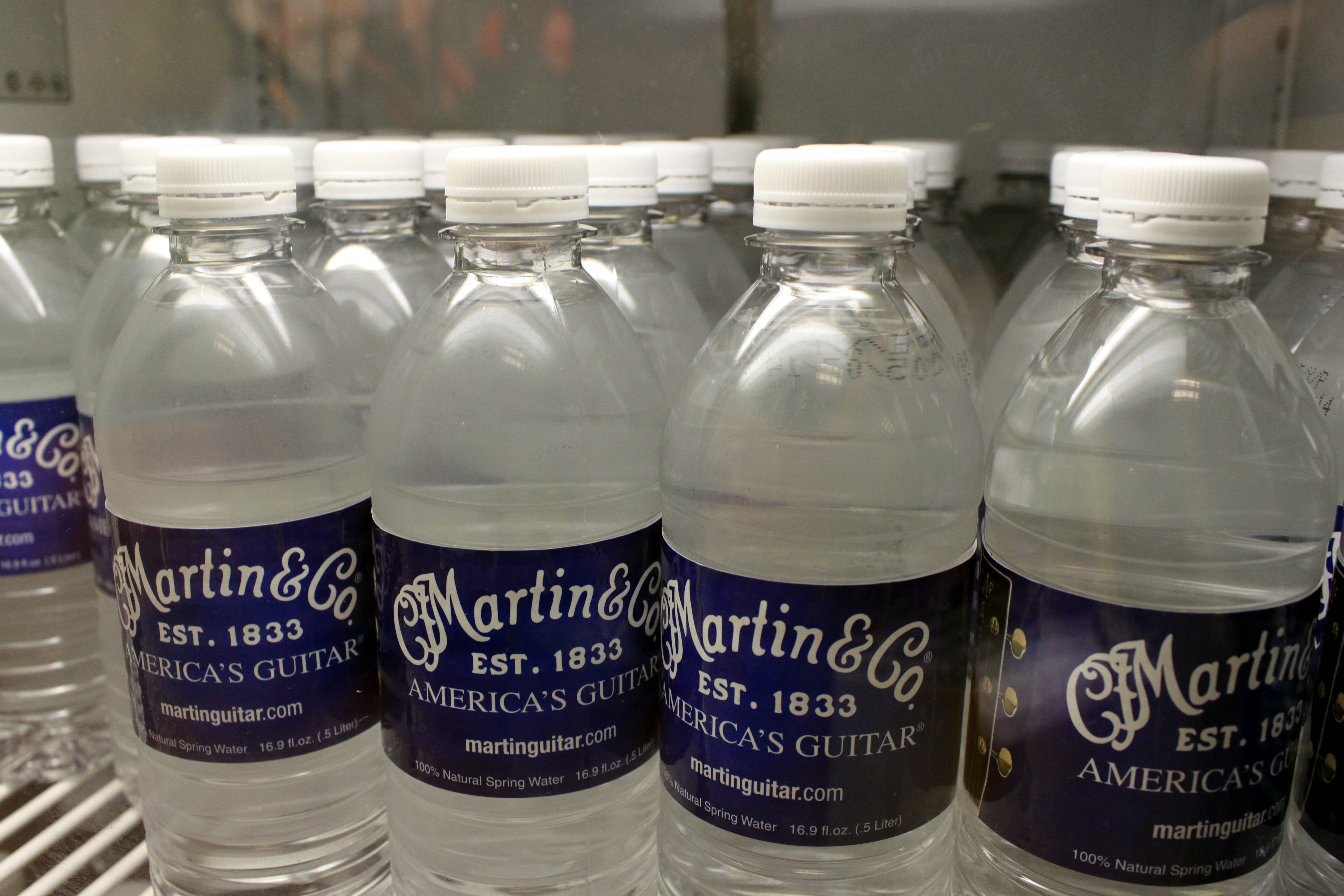 martin 151